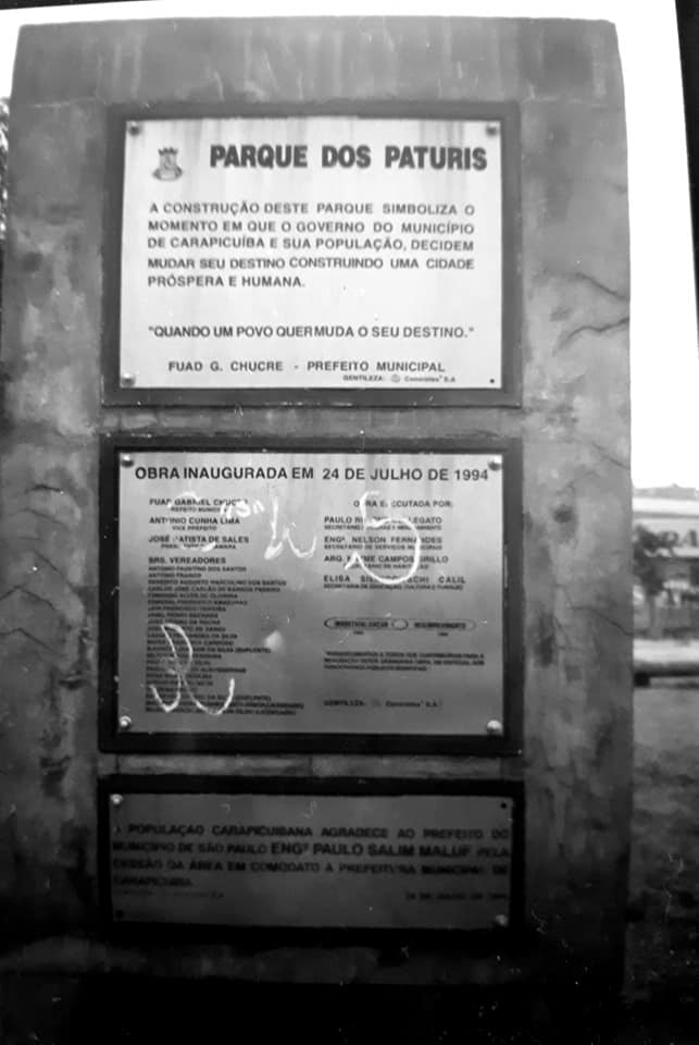 A imagem apresenta as placas de inauguração do parque dos Paturis, já vandalizadas.